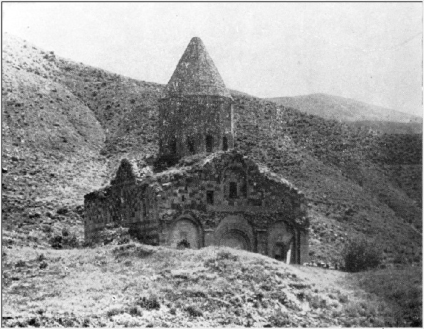 Փառակայի սբ. Կարապետ վանքը St. Karapet church, Paraka